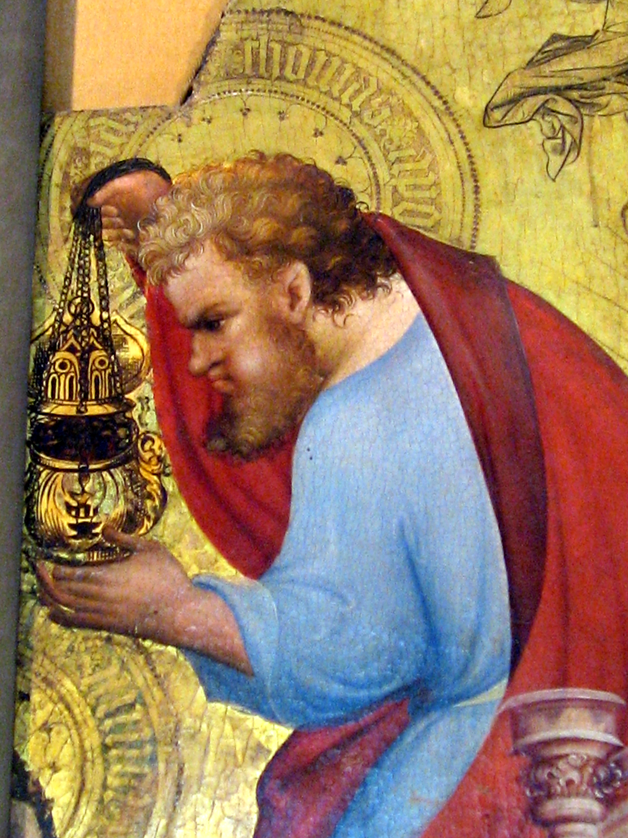 Links oben Beschädigungen durch früheren Beschnitt der Bildtafeln